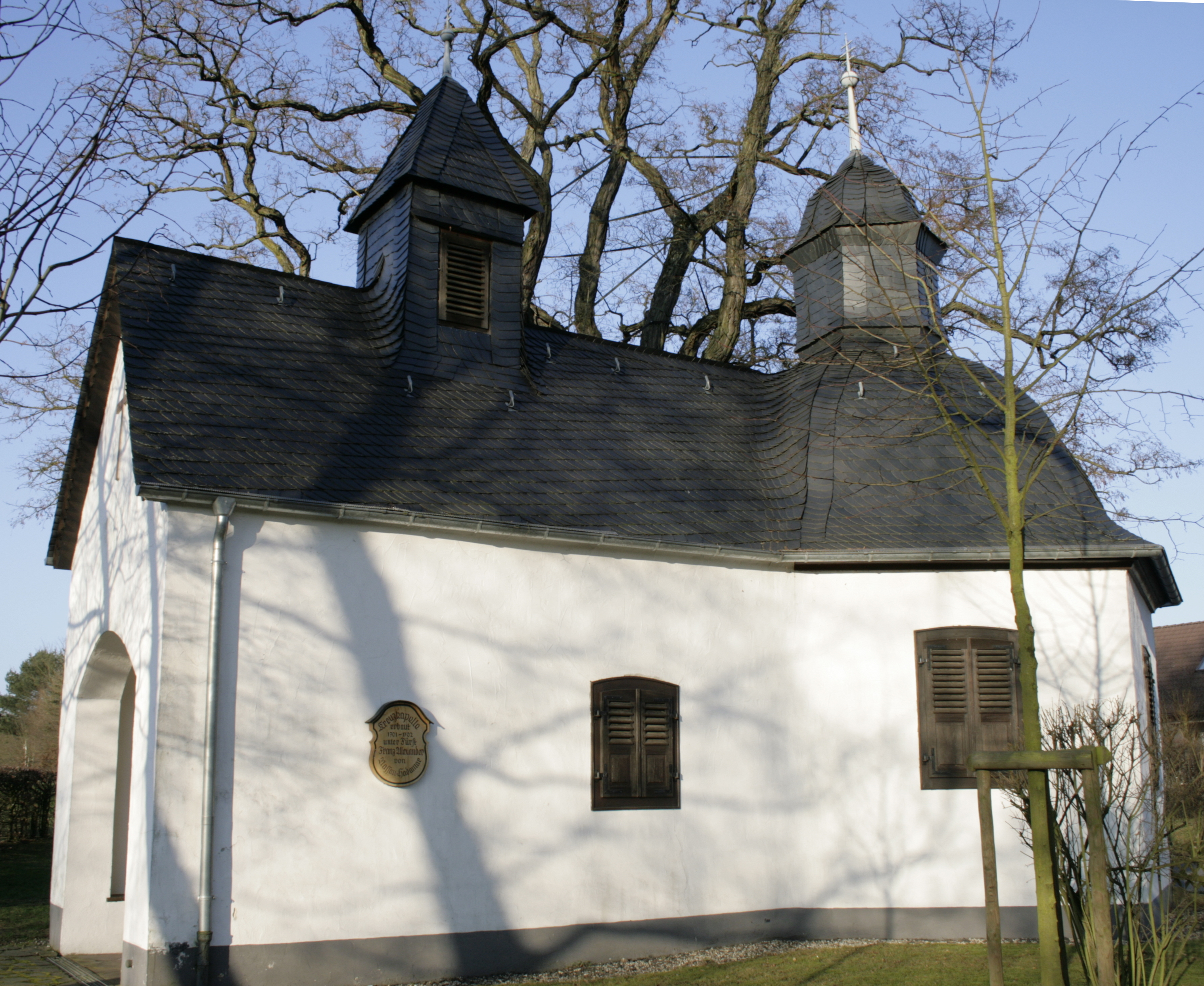 Kreuzkapelle in Hadamar-Niederzeuzheim, Deutschland